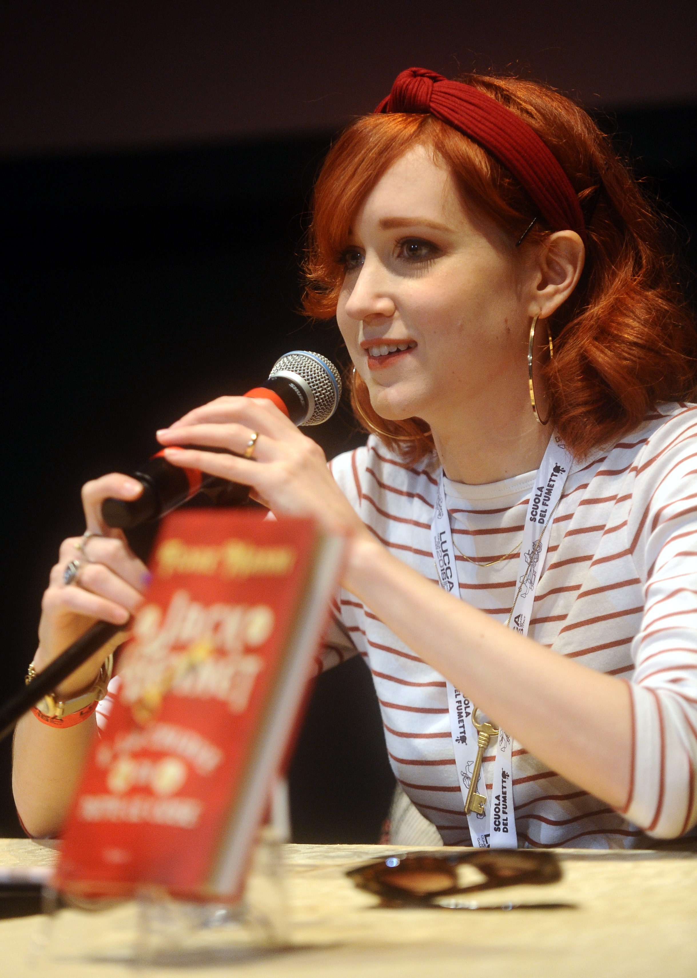 Fiore Manni a Lucca Comics & Games. Auditorium San Girolamo.